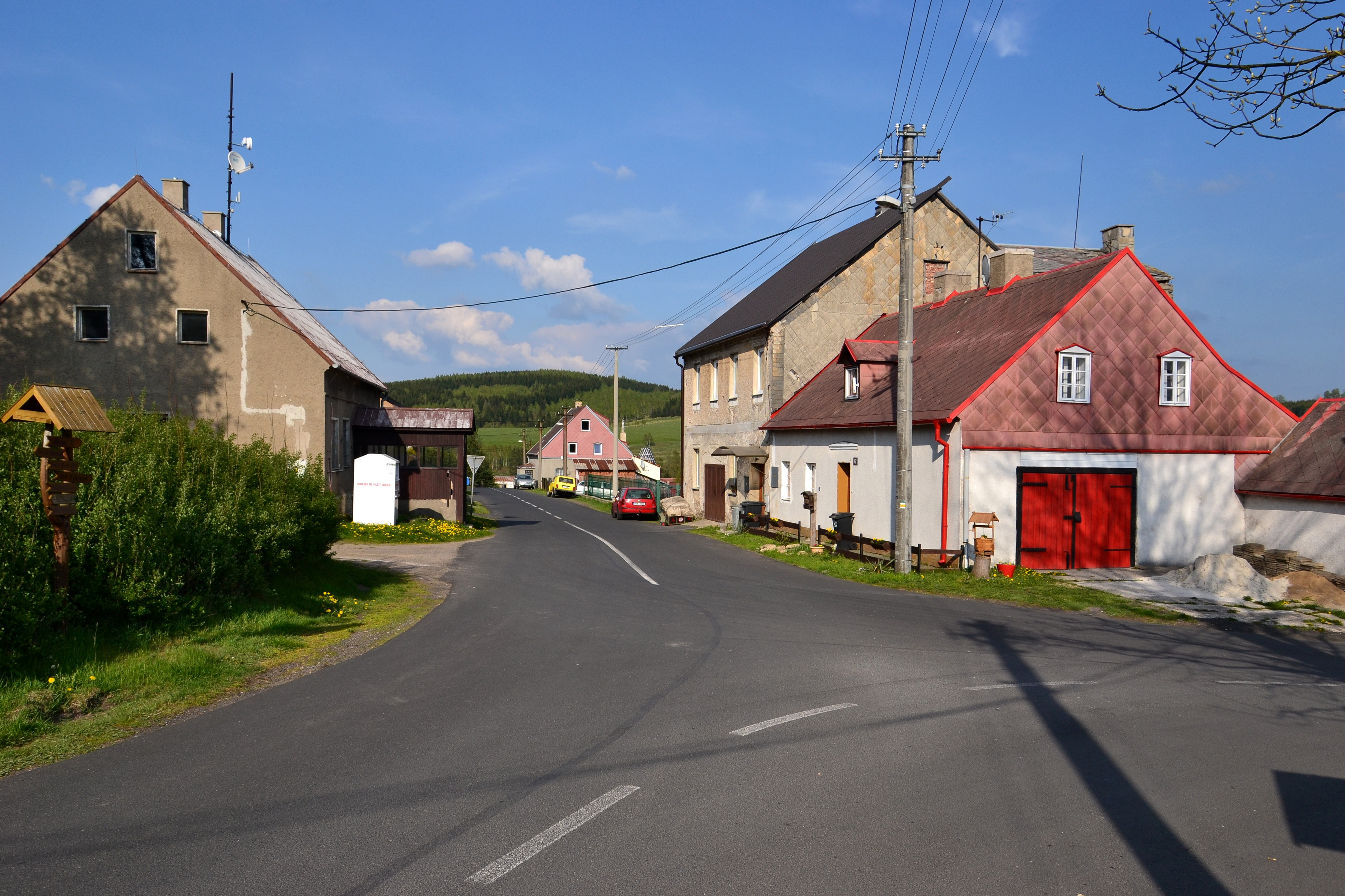 Kalek – domy u křižovatky silnic